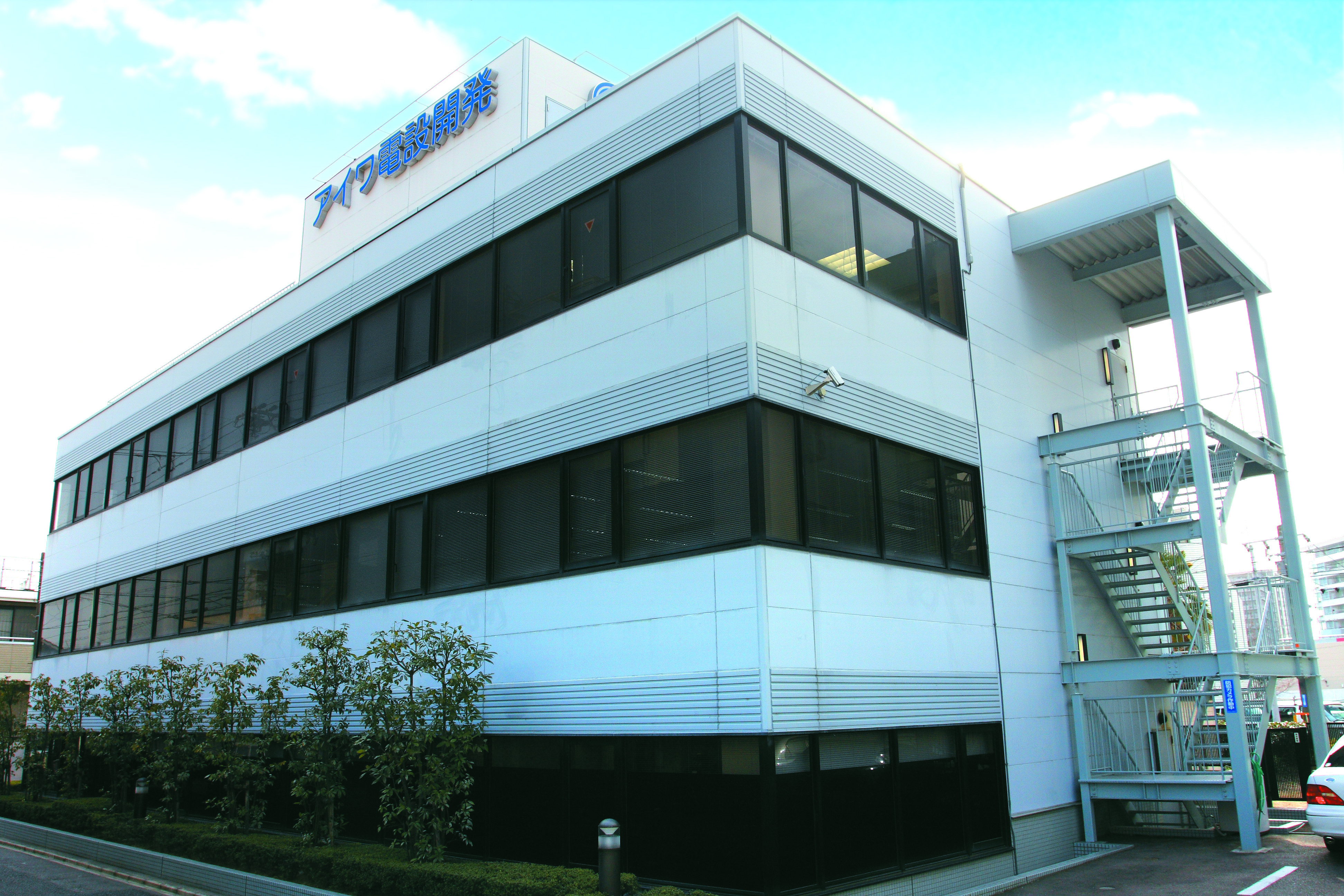 アイワ電設開発本社_201811